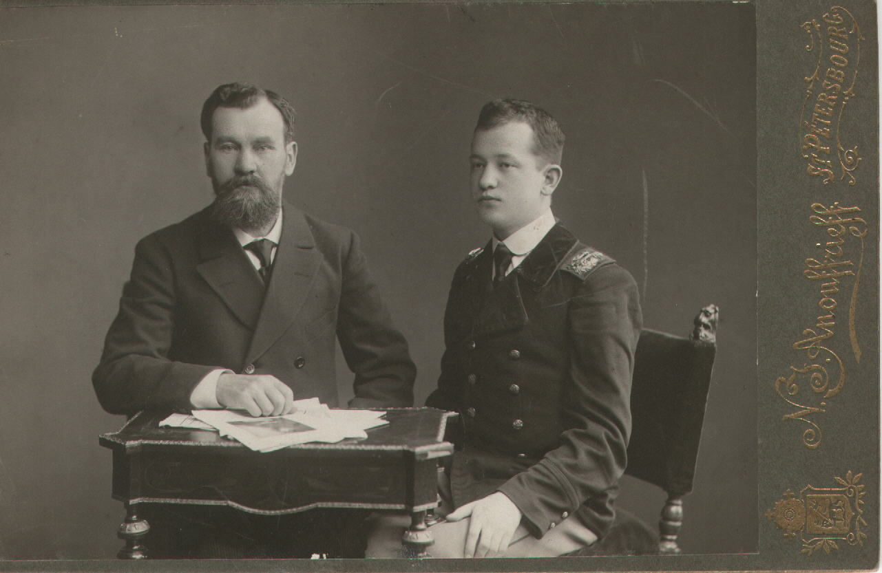 Фотография из семейного альбома Андрея Алексеевича Шустикова